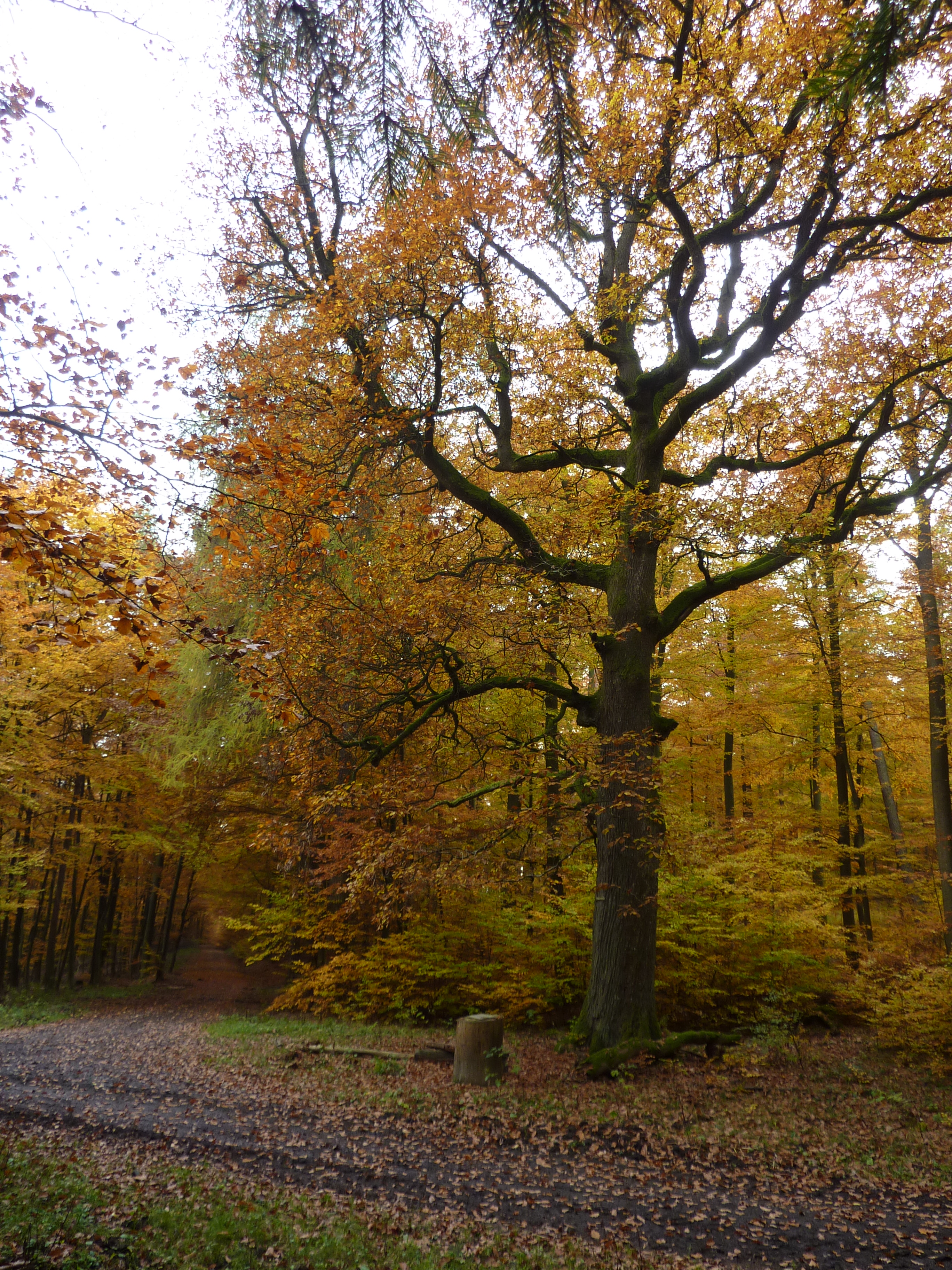 Grenzbaum „Heul-Eiche“ bei Bad Endbach-Wommelshausen